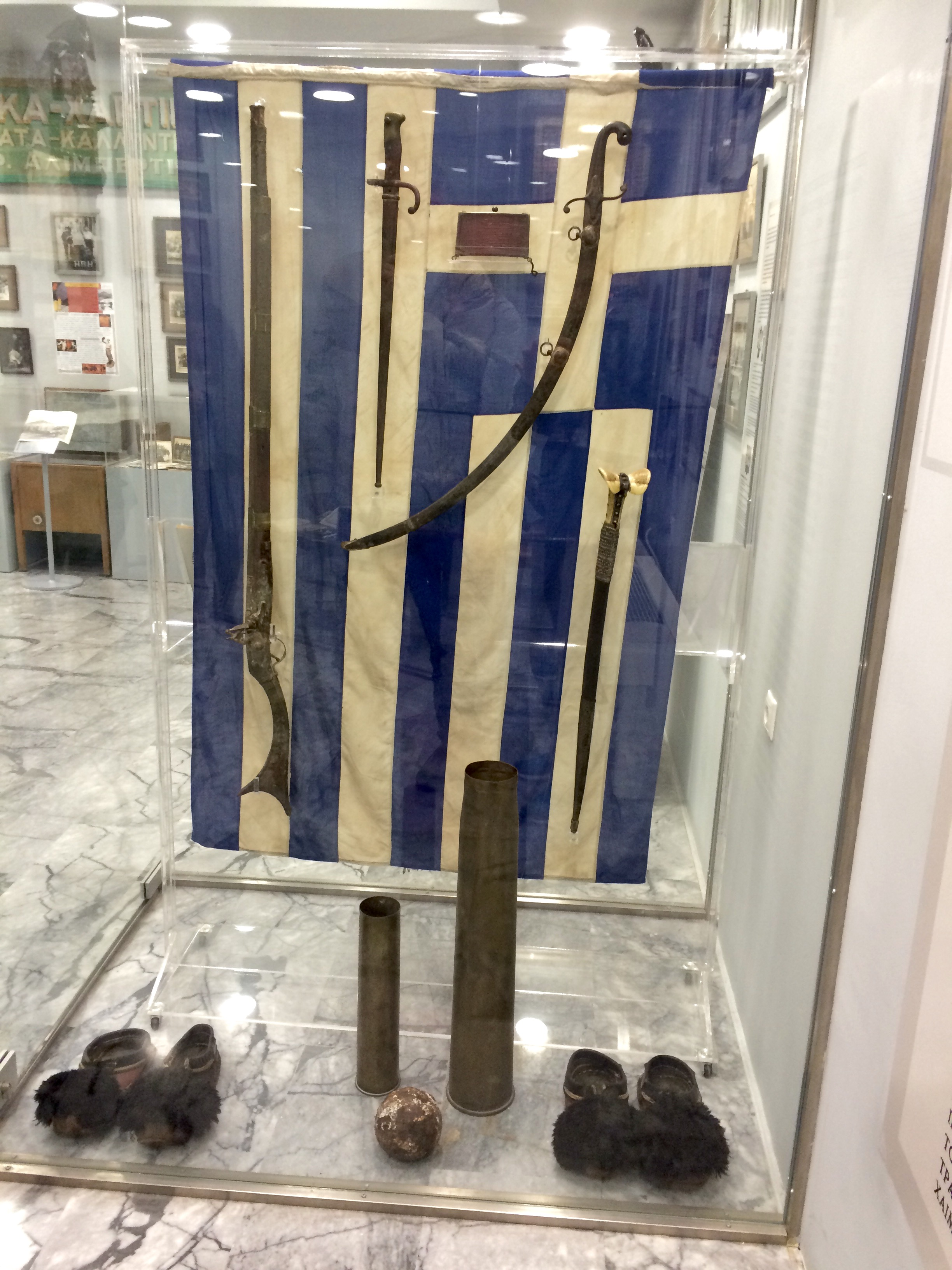 Όπλα Κων/νου Λίτσικα